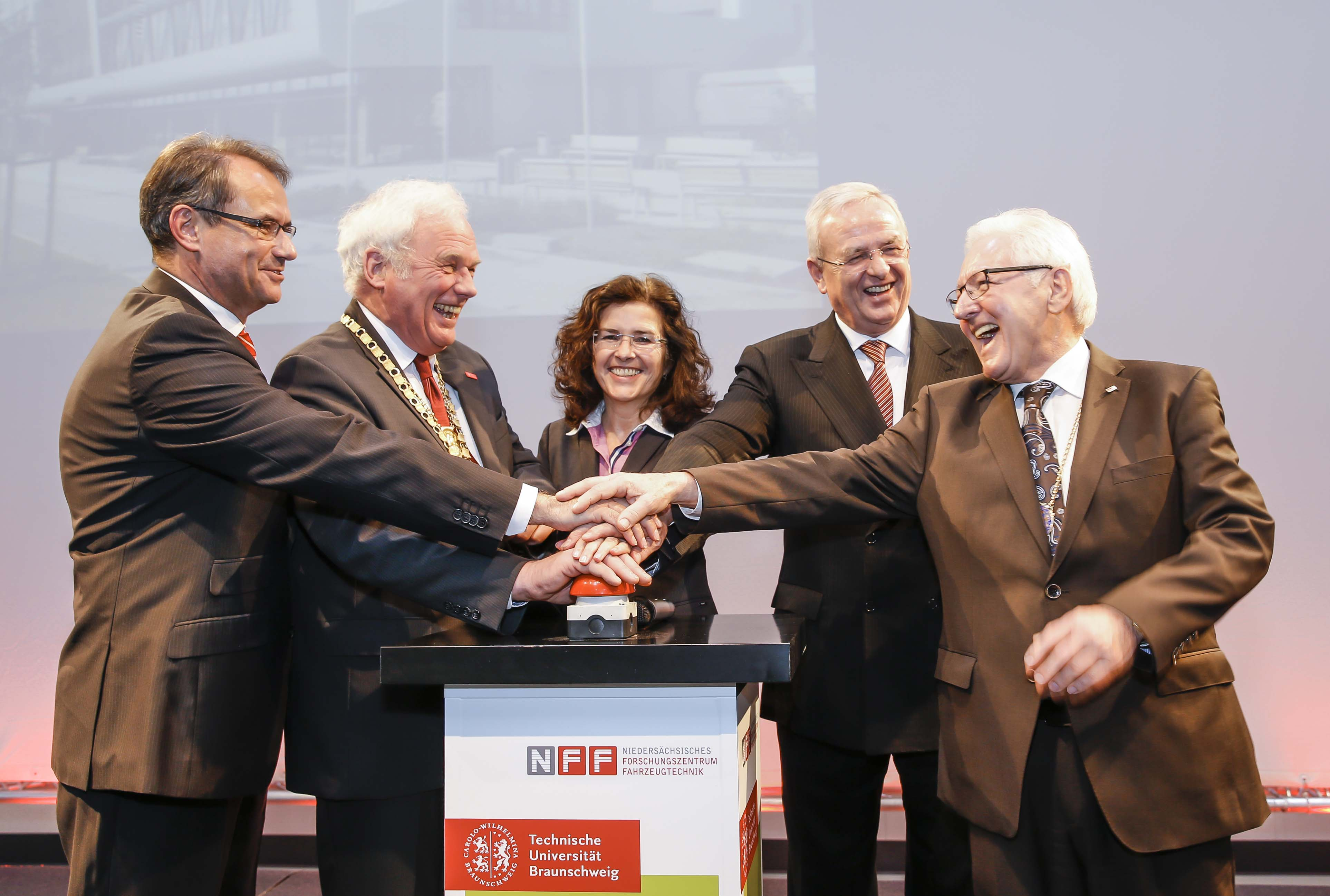 Eröffnung NFF